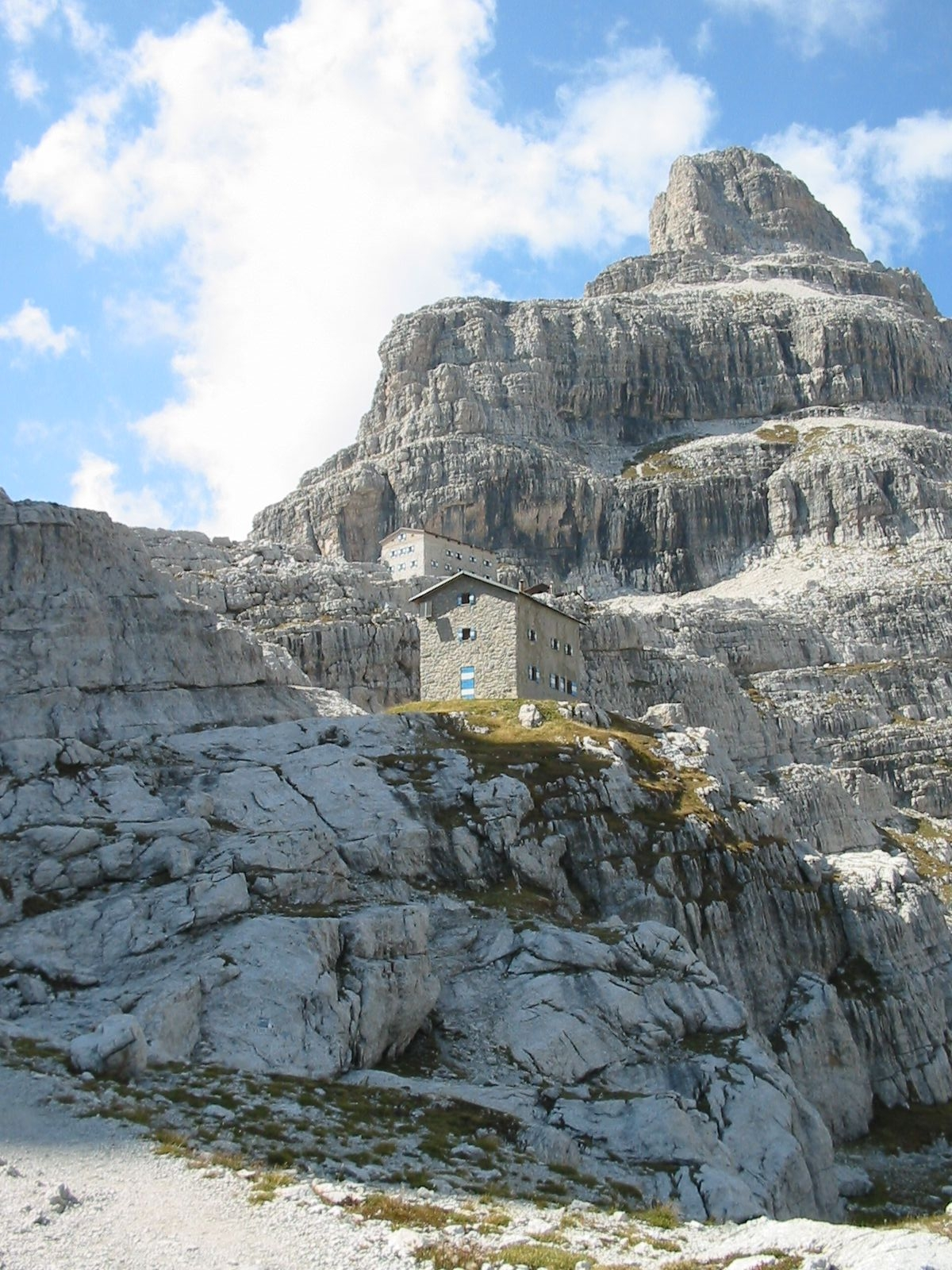 Rifugi Pedrotti e Tosa nelle Dolomiti di Brenta - Pedrotti and Tosa Huts in the Brenta Dolomites